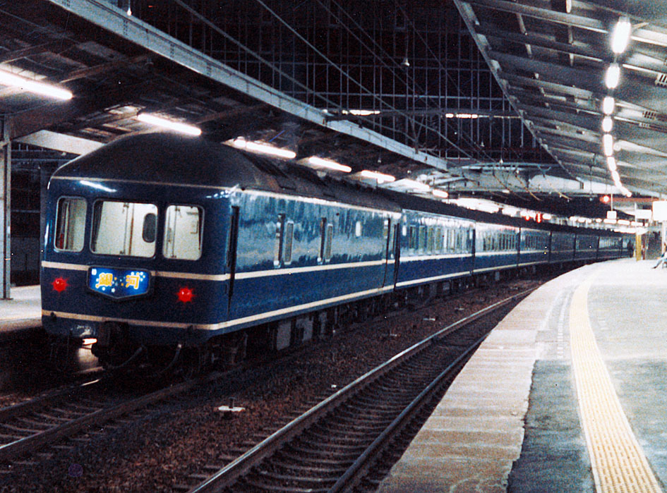 国鉄20系客車 カヤ21 急行「銀河」